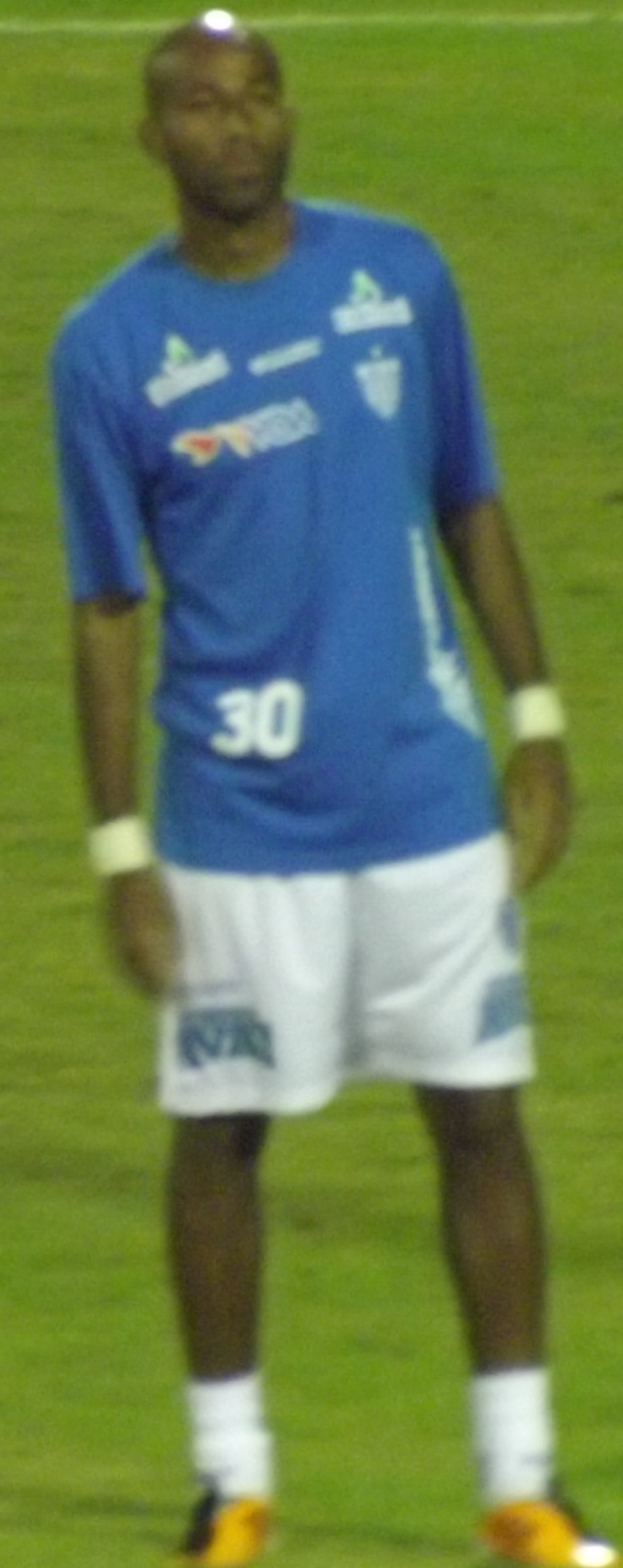 Nunes atuando pelo Avaí.